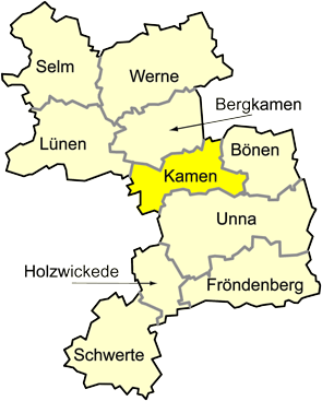 Germany Kreis Unna Kamen geografische Lage im Kreis